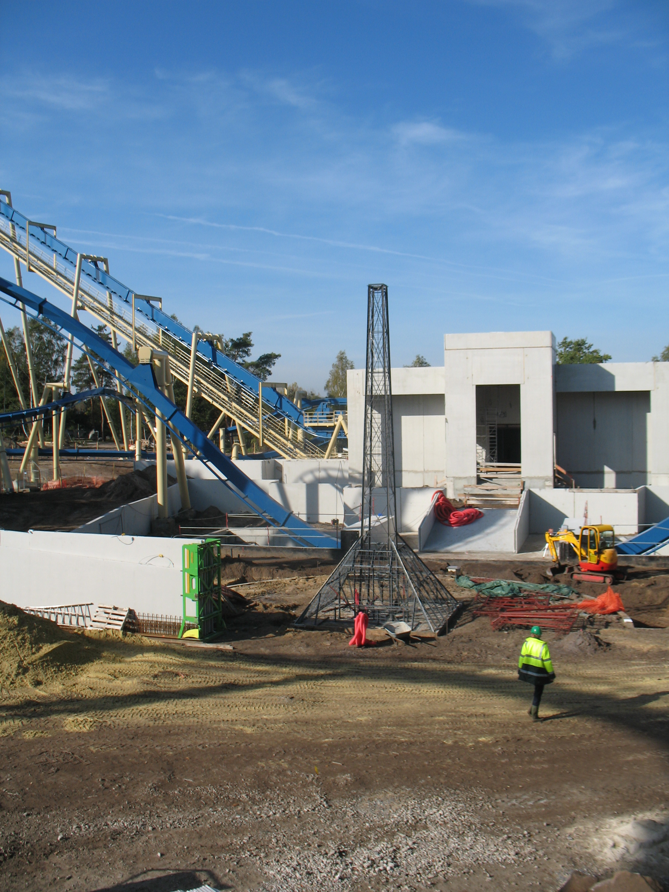 OzIris et la zone égyptienne du Parc Astérix en construction, vu depuis Menhir Express.